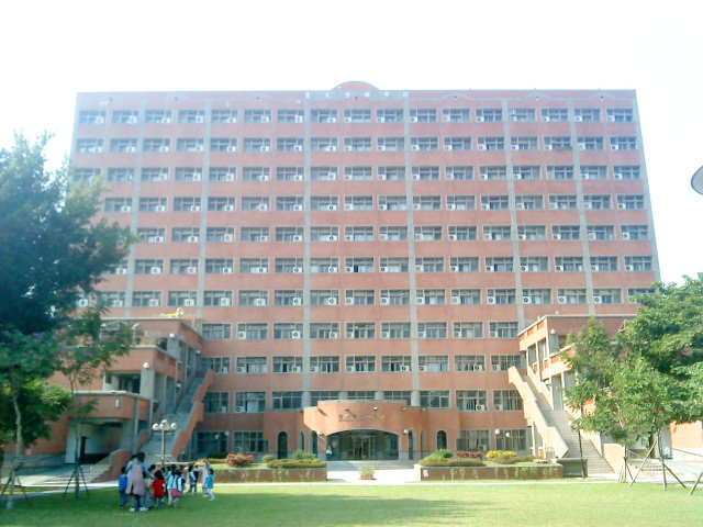 臺灣大學管理學院二號館